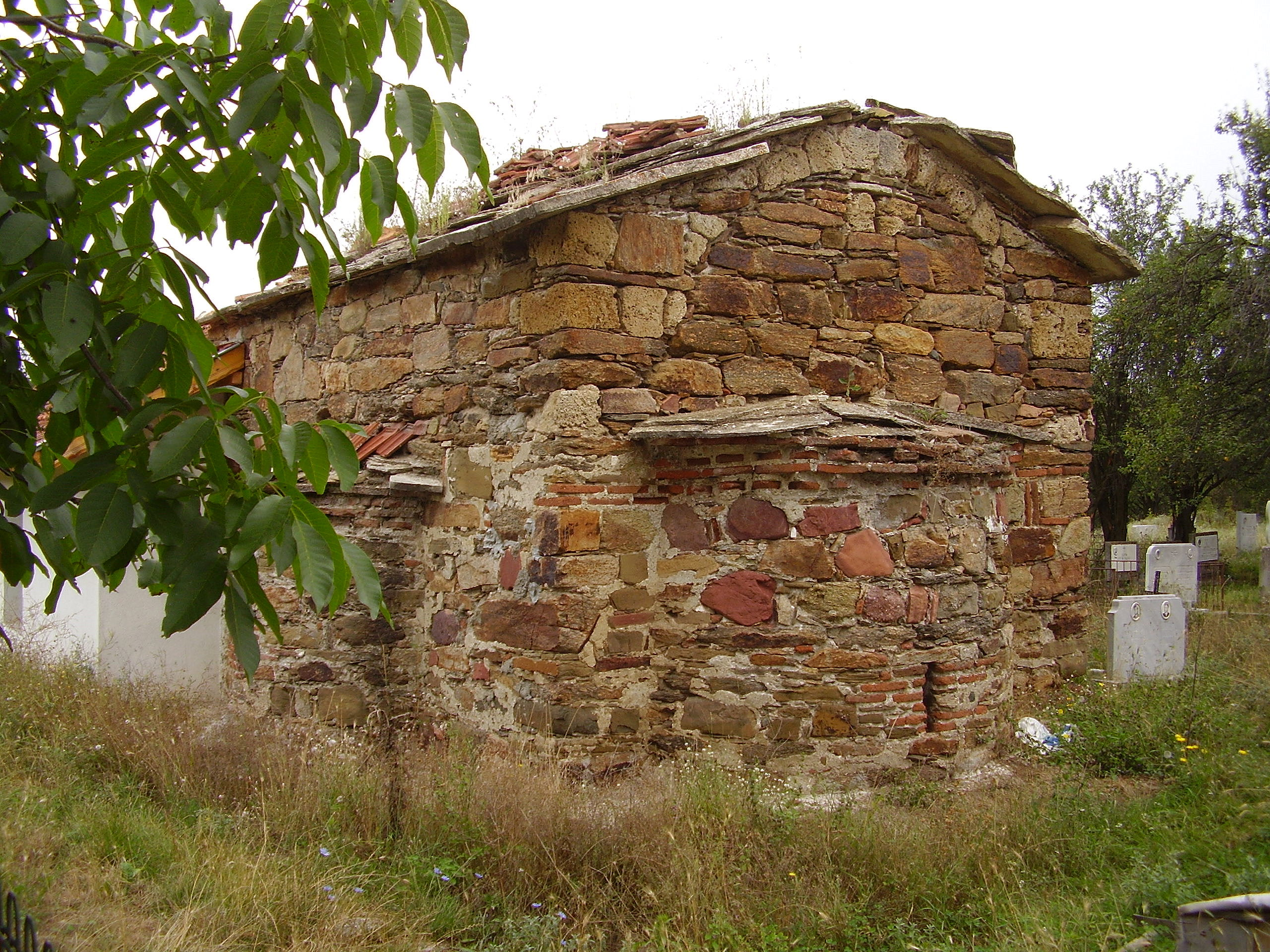 Църквата Св.Богородица - с.Долна Диканя